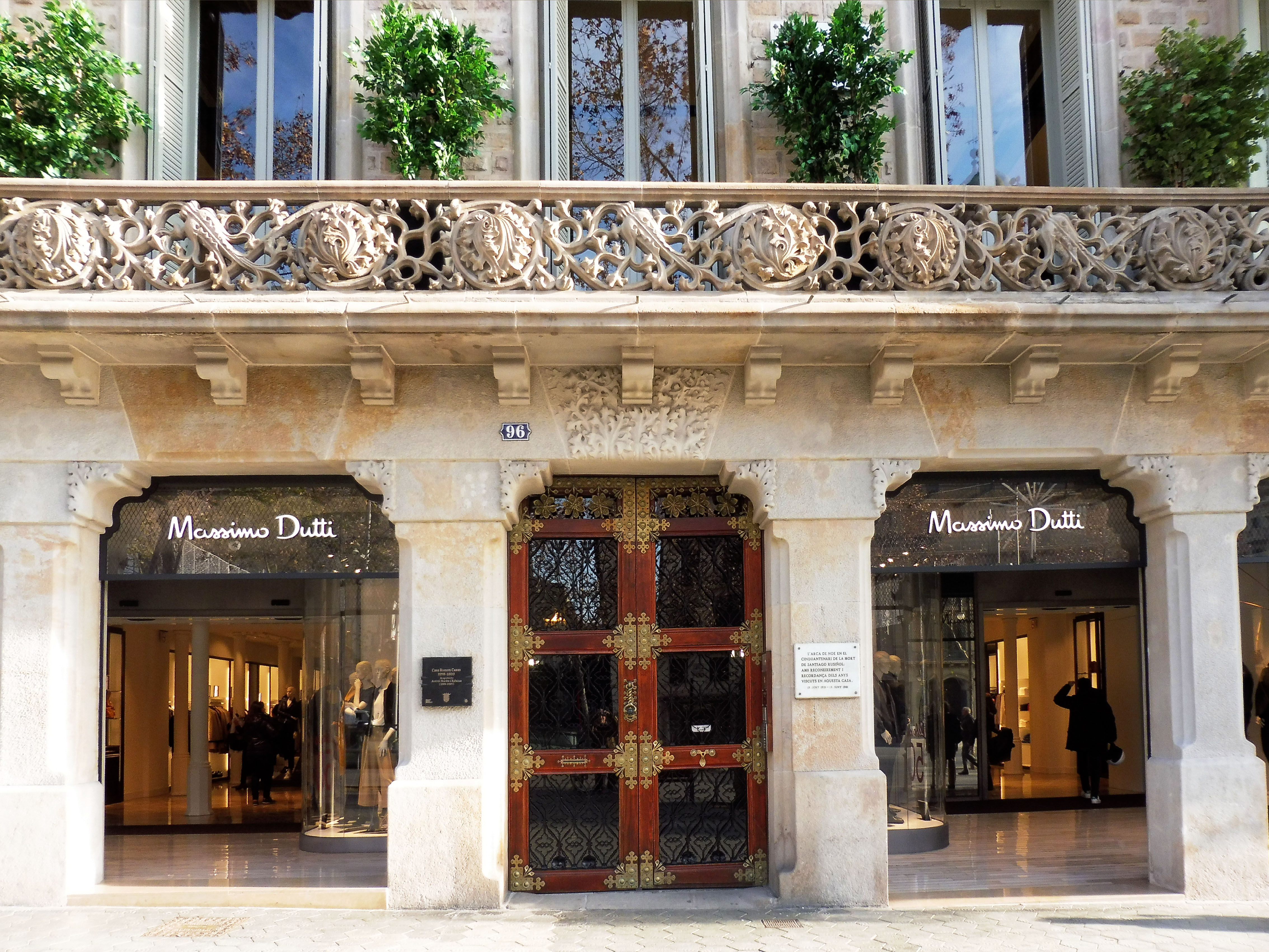 1961-Passeig de Gràcia 96. Bastida (Assumpta), barrets i confecció per a senyores, 1r 1ª. Galeries Vinçon Stat. Anònima, magatzem i venda de pisa. Institut d'Estudis Nord-Americans. Sainz de la Maza (Francesc), acadèmia de dibuix, 3r 1ª. L'Arca de Noé, associació cultural. 2010-Passeig de Gràcia 96. Galerias Vinçon, magatzem i venda de cristalleria, pisa, objectes de regal i sala d'exposicions d'art. 2016-Passeig de Gràcia 96. Massimo Duti, sastreria i moda jome dona.